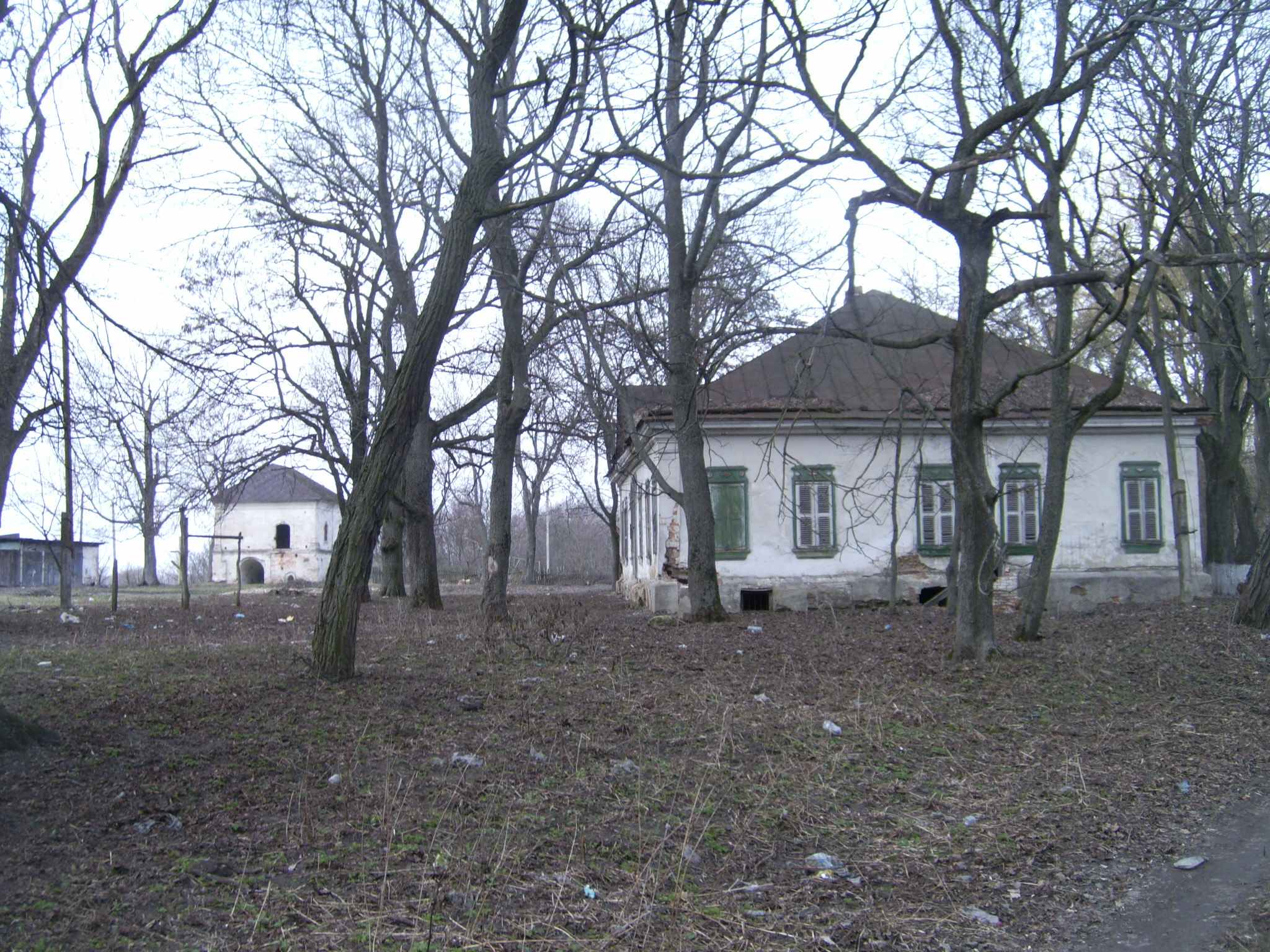 Покорщина. Панський будинок та кам'яниця Дараганів.